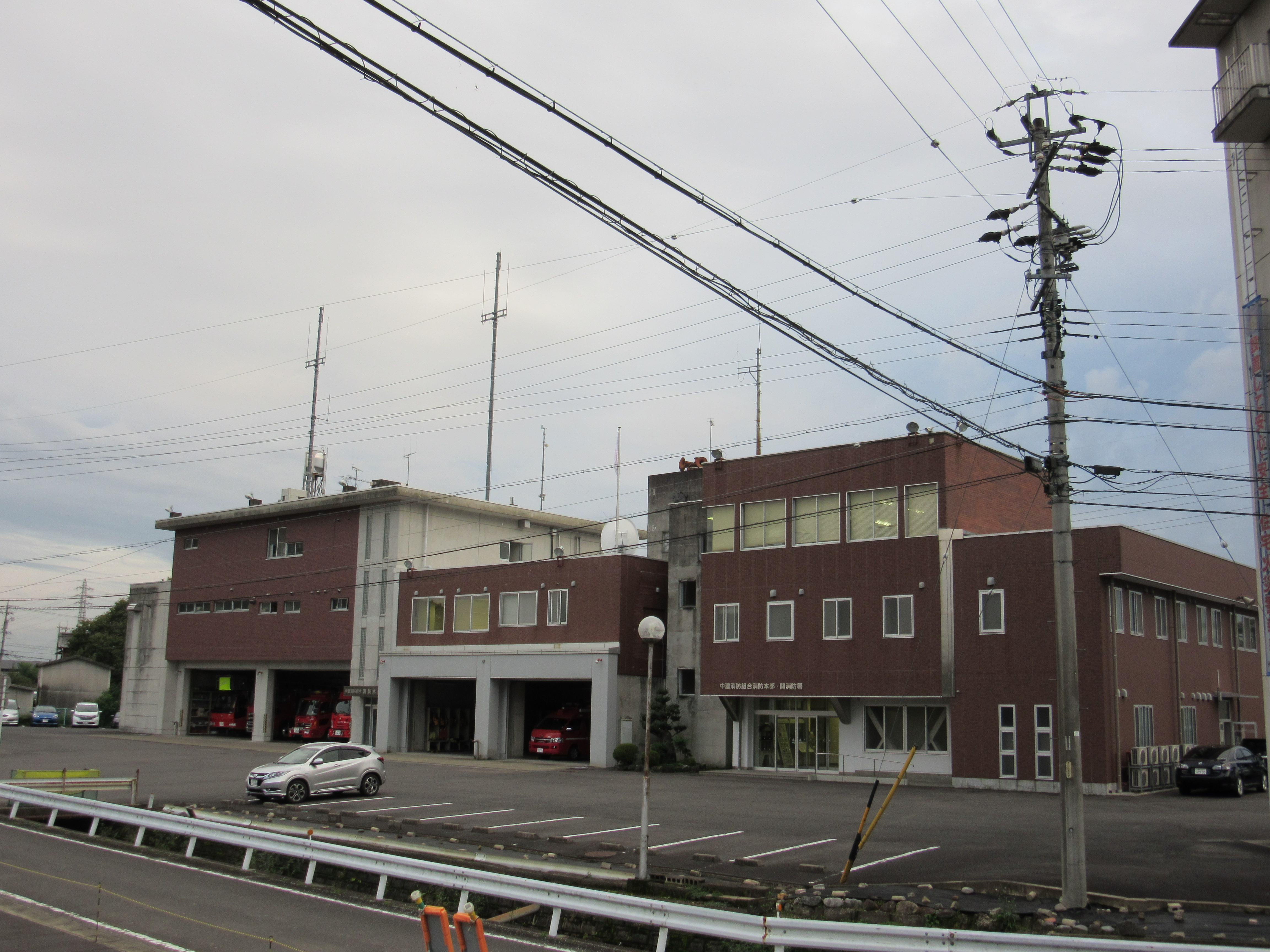 中濃消防組合